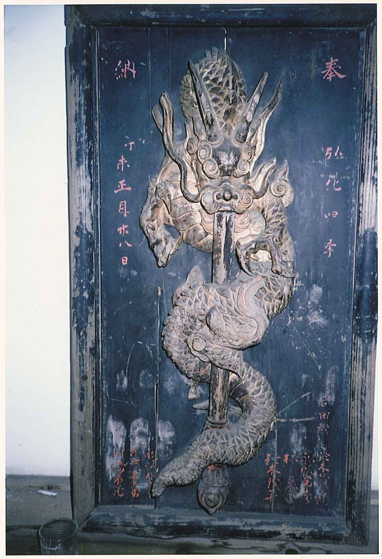 倶利伽羅龍の額